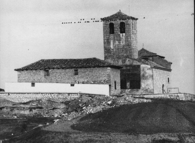 Iglesia parroquial de Santa Eulalia de Mérida - Matilla de los Caños (Valladolid) - Fotografía 112 x 85 B/N